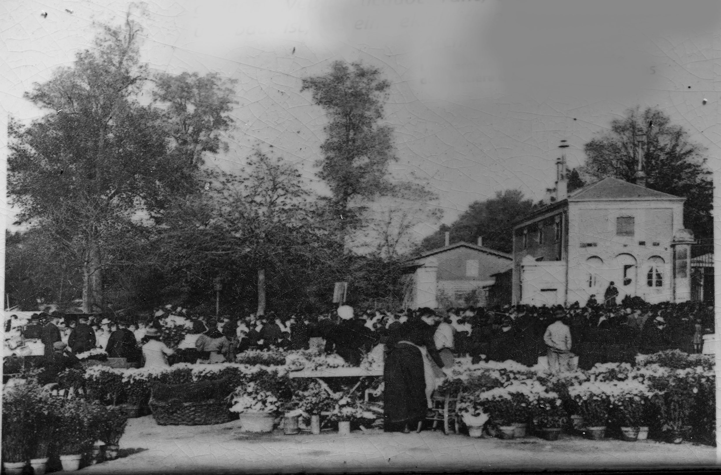 jour de marché aux fleurs devant l'entrée du cimetière.